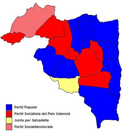 Partits polítics més votats als municipis del Baix Maestrat (País Valencià) després de les eleccions municipals de 2007.